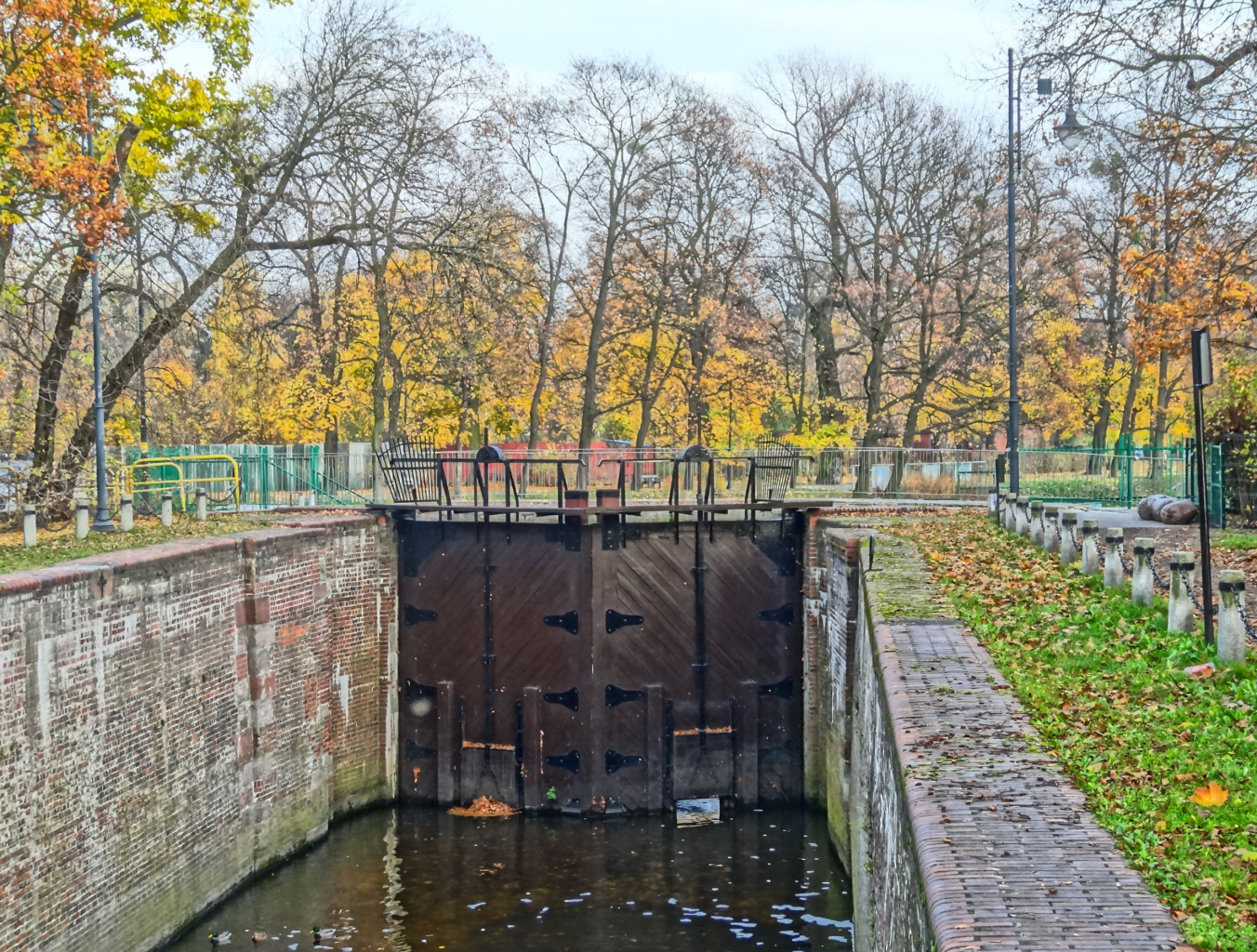 Śluza IV przy ul. Wrocławskiej w Bydgoszczy na Starym Kanale Bydgoskim